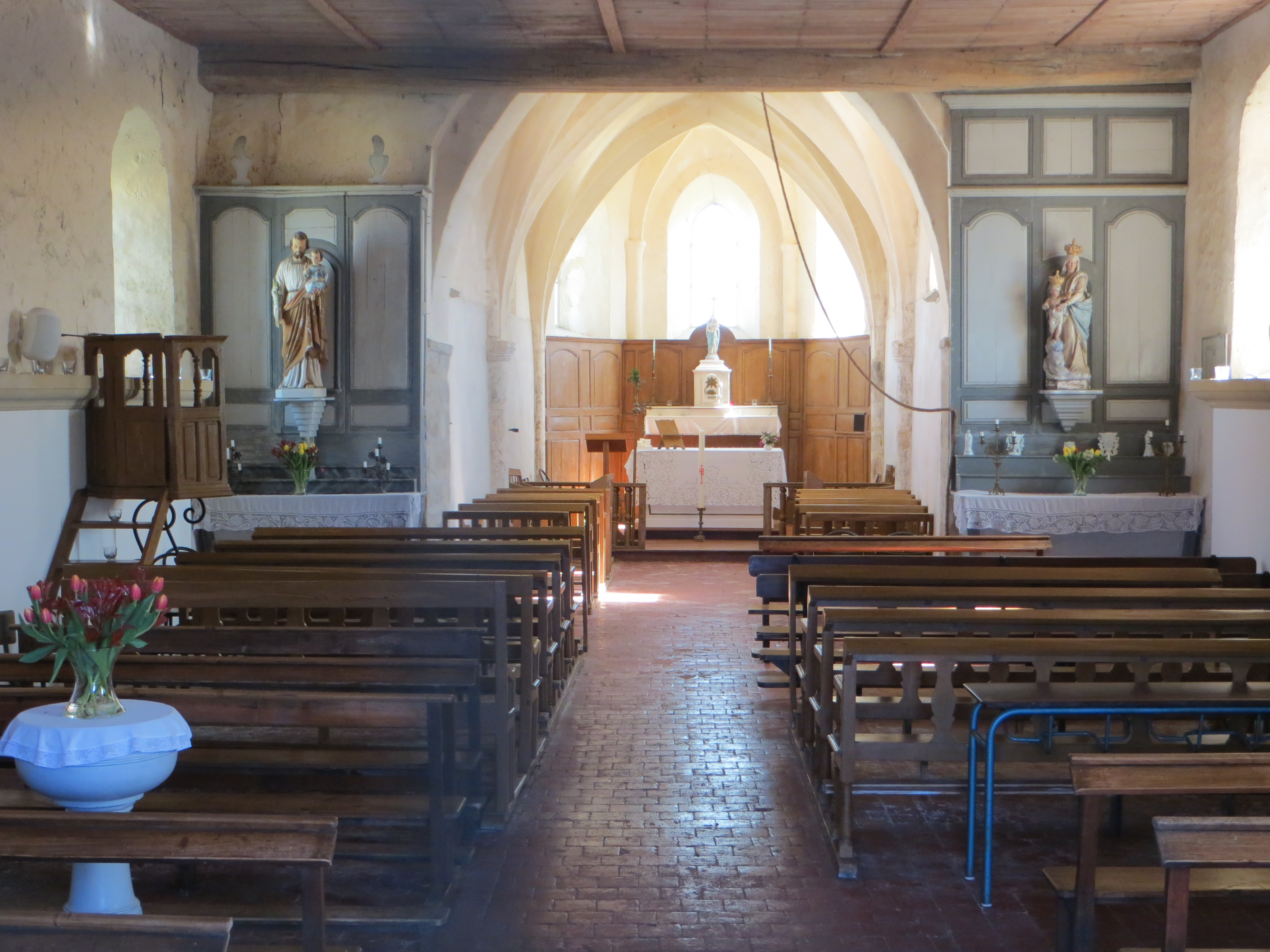 Nef de l'église